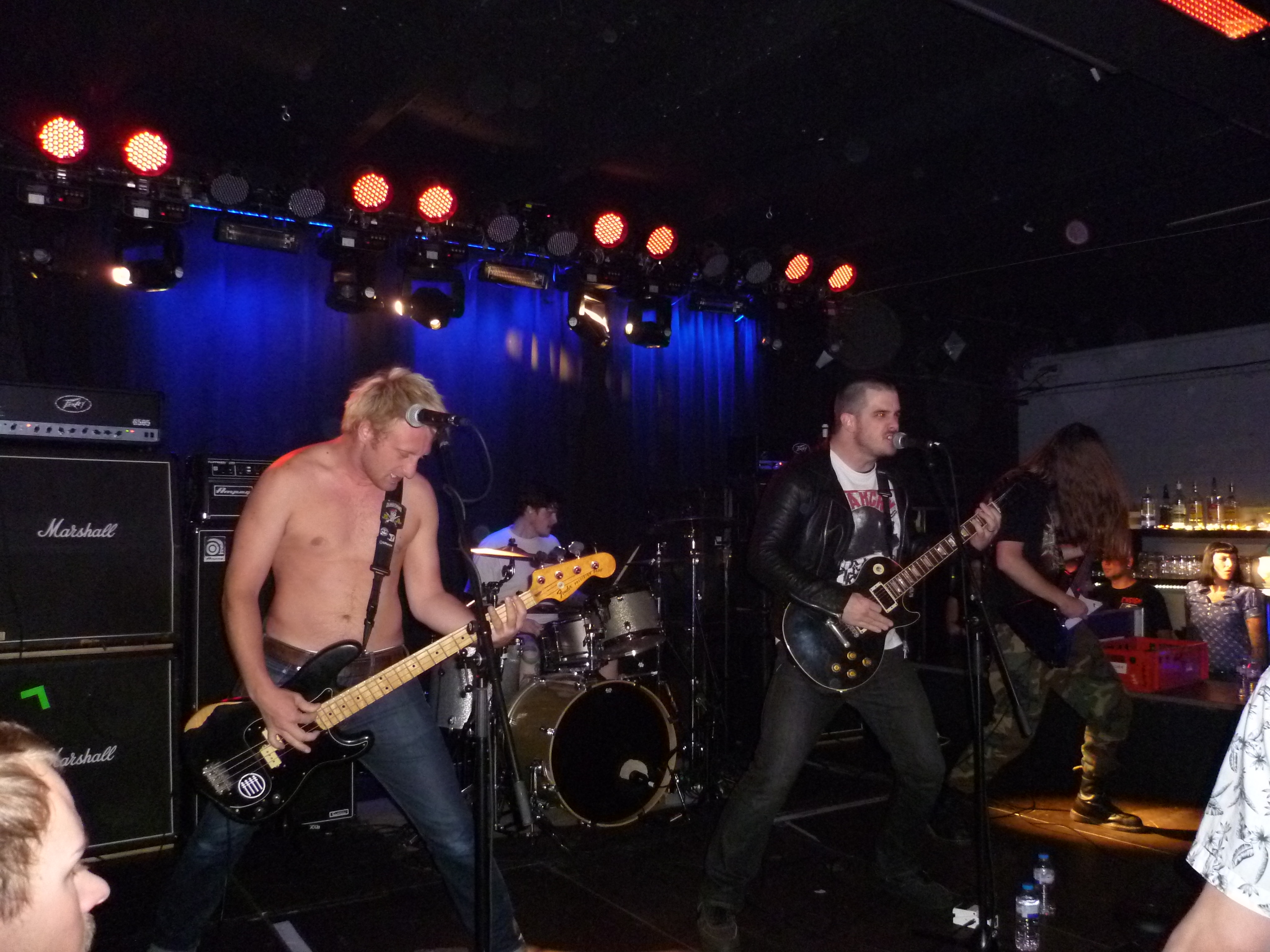 Nails live im Kleinen Klub (Saarbrücken)